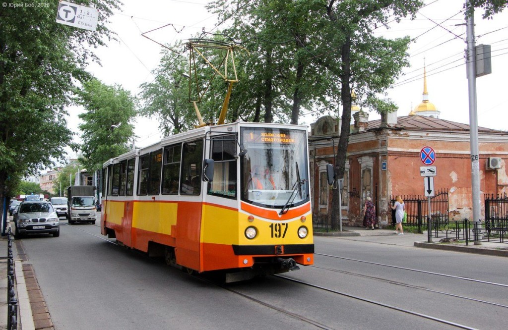 Иркутский трамвай. На фото - модернизированный КТМ-5.